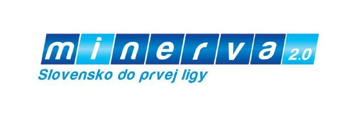 Logo stratégie Minerva 2.0